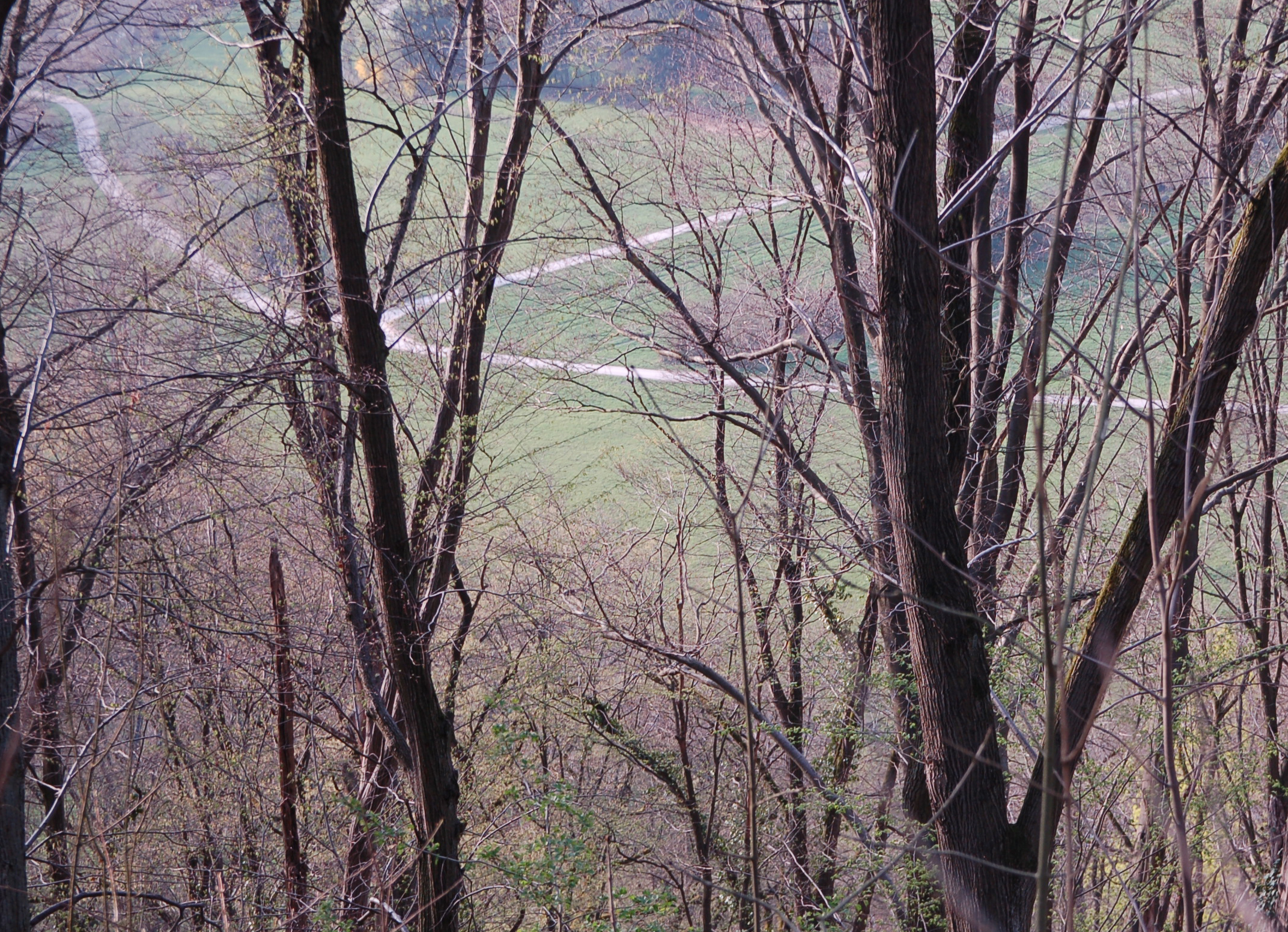 Blick vom Burgstall des Remminger Schlössles auf den Siedlungsplatz Remmigheims